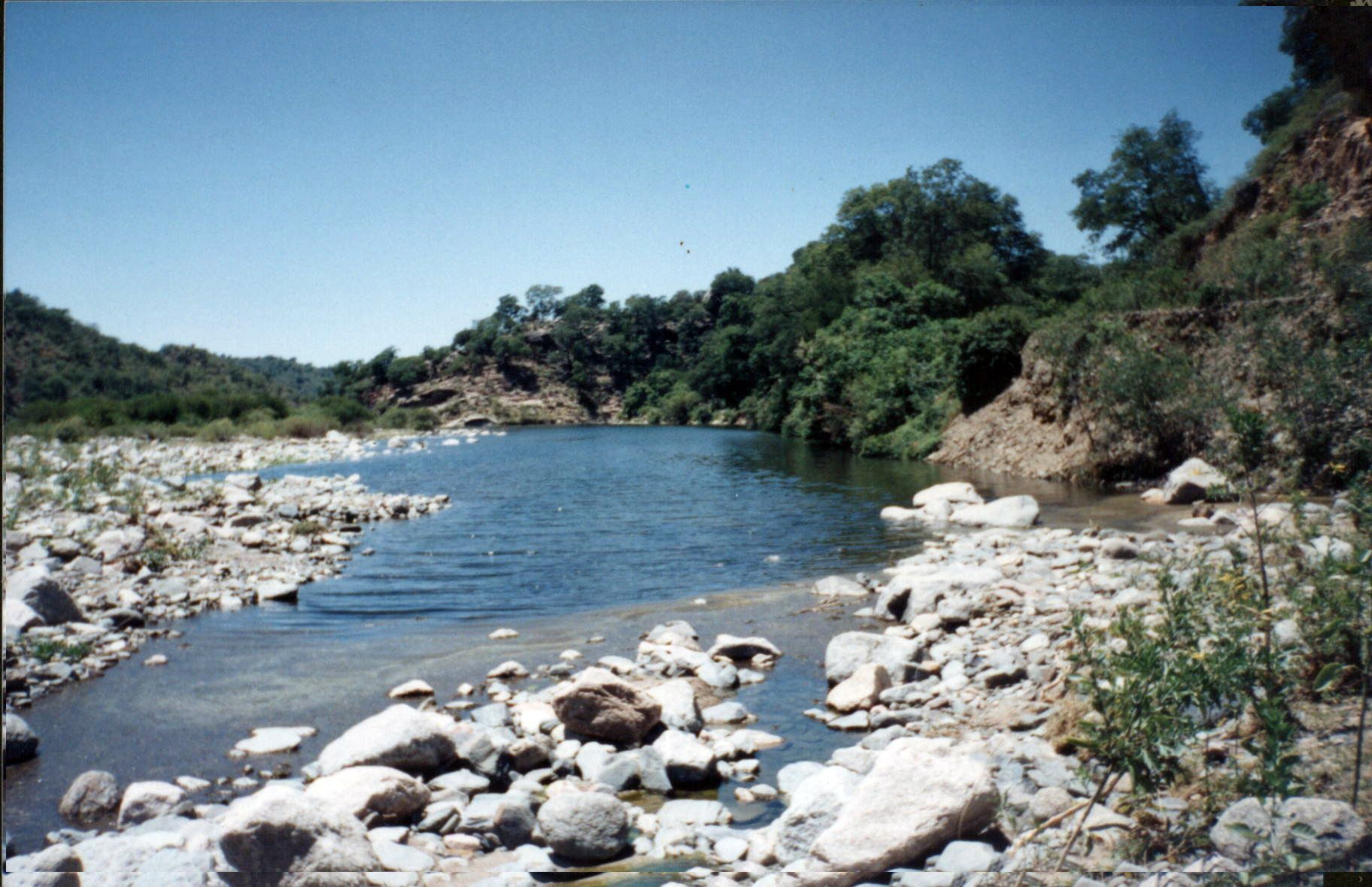 Río Olta, antes del dique